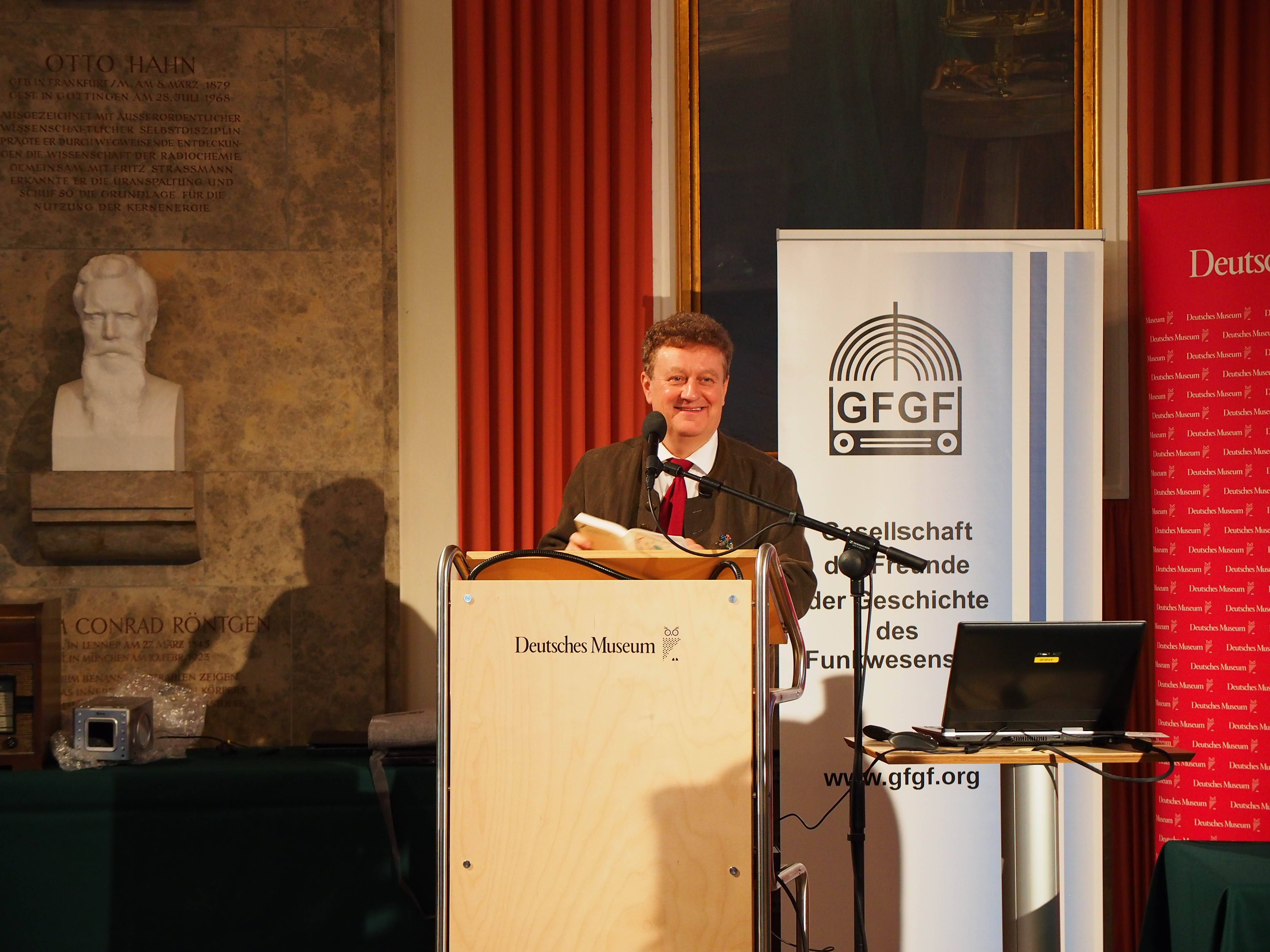 Prof. Dr. Wolfgang M. Heckl spricht zur Eröffnung der GFGF e.V. Mitgliederversammlung 2016 im Ehrensaal des Deutschen Museums.